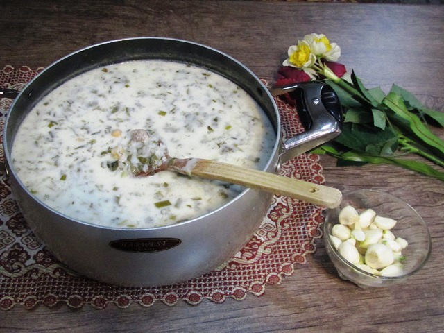 آش دوغ اردبیل